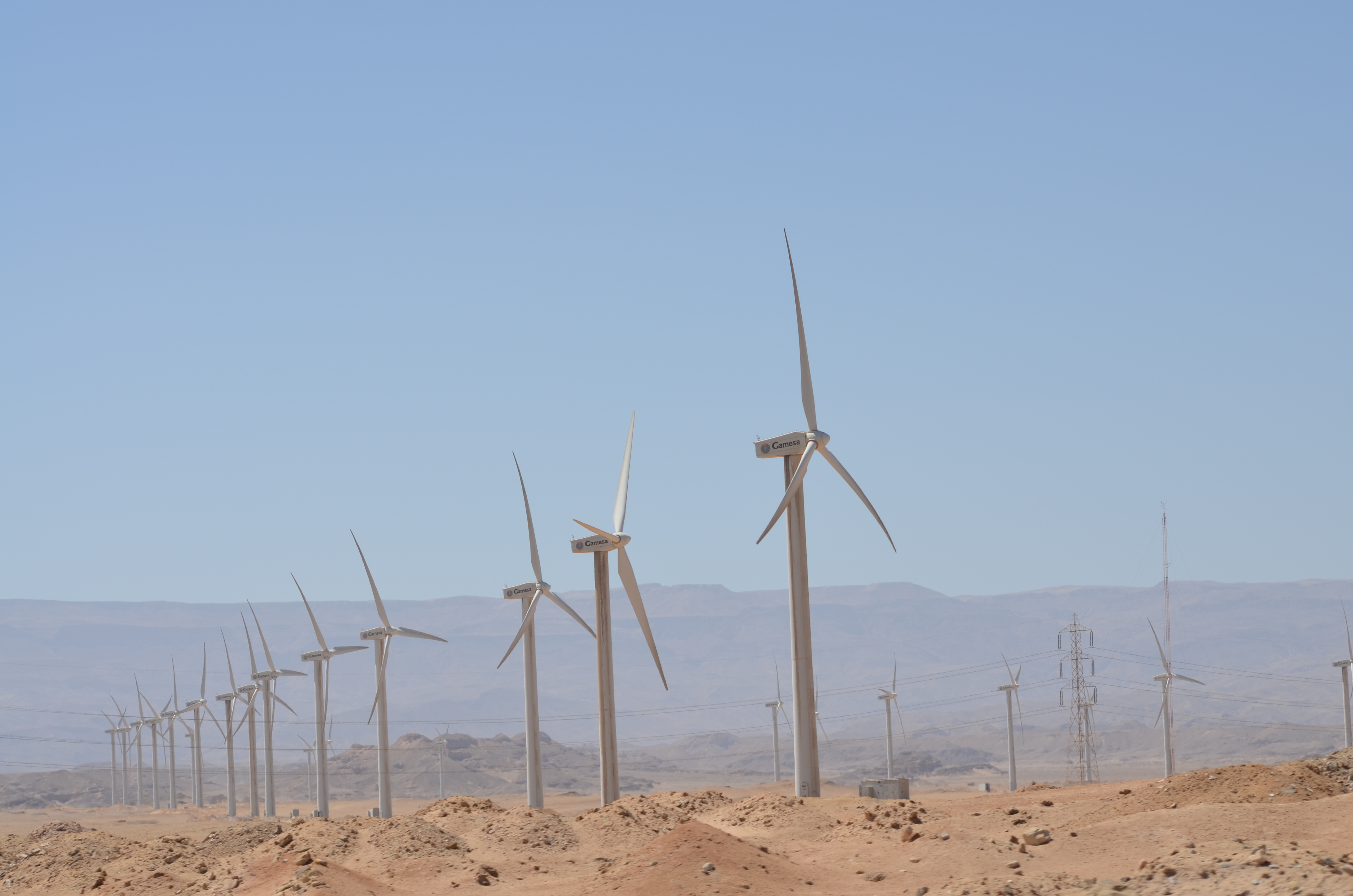 محطة الزعفرانة لتوليد الكهرباء من طاقة الرياح